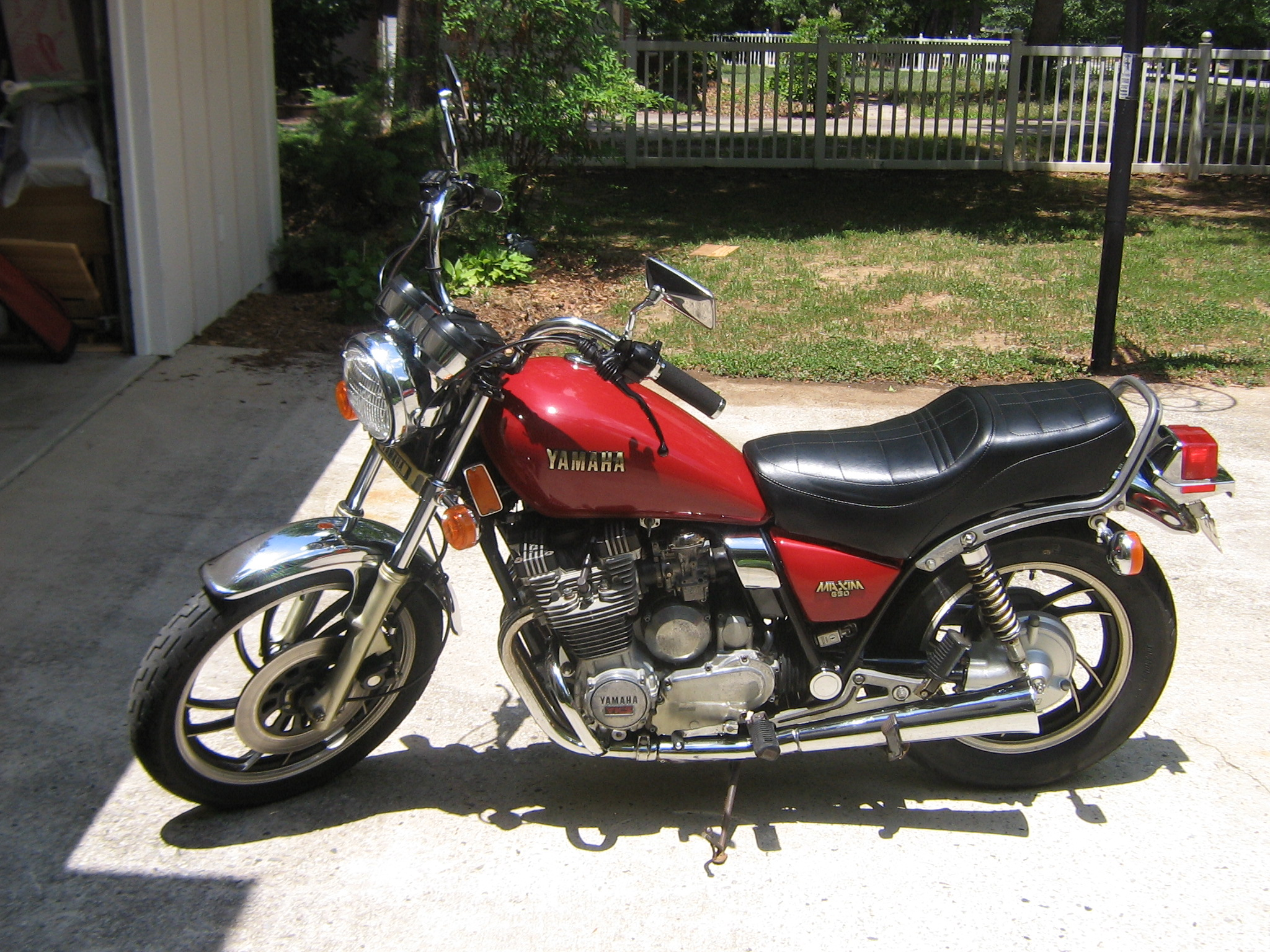 Yamha XJ650